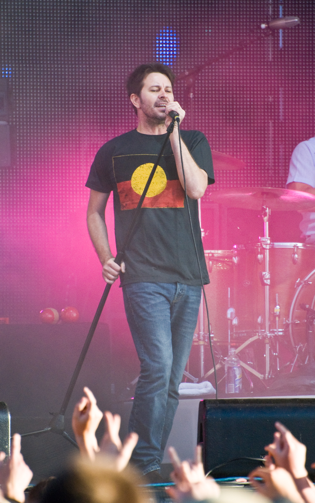 Bernard Fanning of Powderfinger performing at Big Day Out 2010